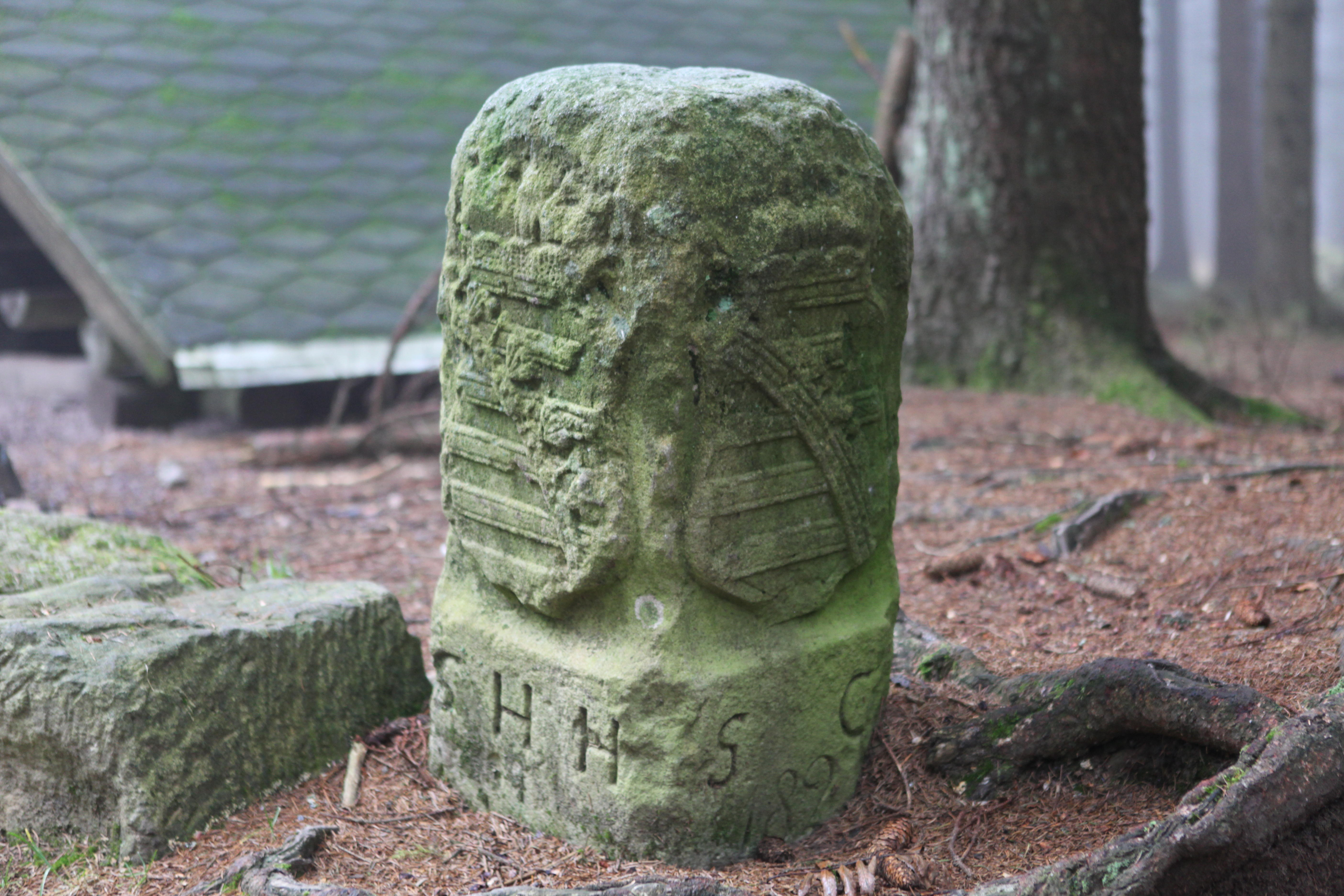 Dreiherrenstein 18. Jh, Fürstentümer Sachsen-Hildburghausen, Sachsen-Coburg, bei Scheibe-Alsbach in Thüringen